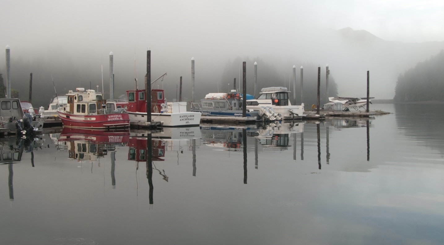 Seldovia, Alaska, boats, fog